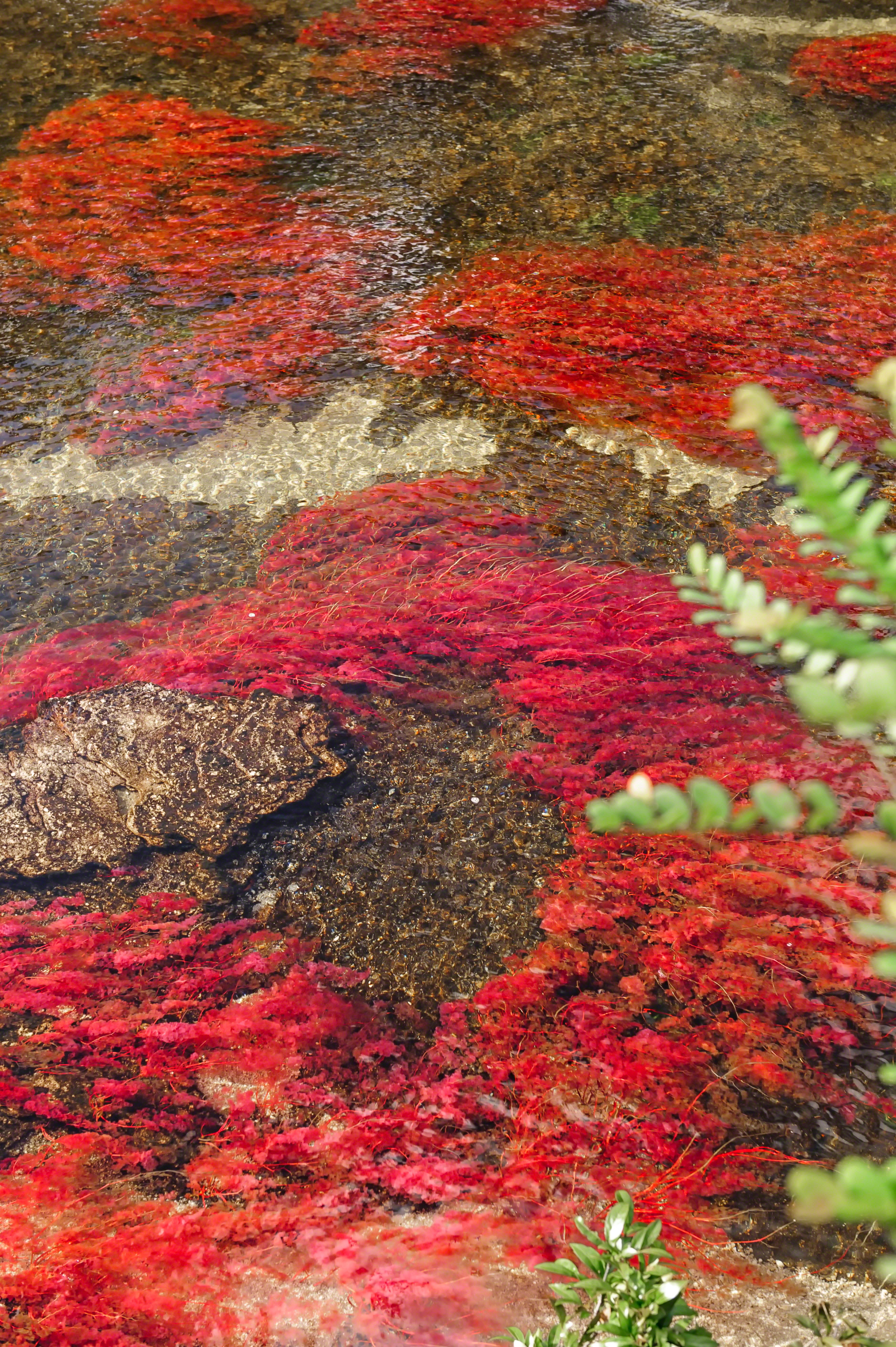 Detalle de la planta acuática que le da color, particularmente rojo, a Caño Cristales. Esta planta acuática se llama Macarenia Clavigera y es endémica de la región. Fotografía por Mario Carvajal, Licenciada con Creative Commons Reconocimiento 3.0 Unported. Usted puede usar esta imagen en cualquier proyecto, inclusive con fines comerciales, siempre y cuando otorgue el crédito de autoría y el vínculo hacia el proyecto de Caño Cristales, correctamente. (